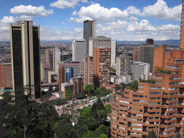 Centro de Bogotá. Torres del Parque, Torre Seguros Tequendama y Torre de las Américas (Bancafé).